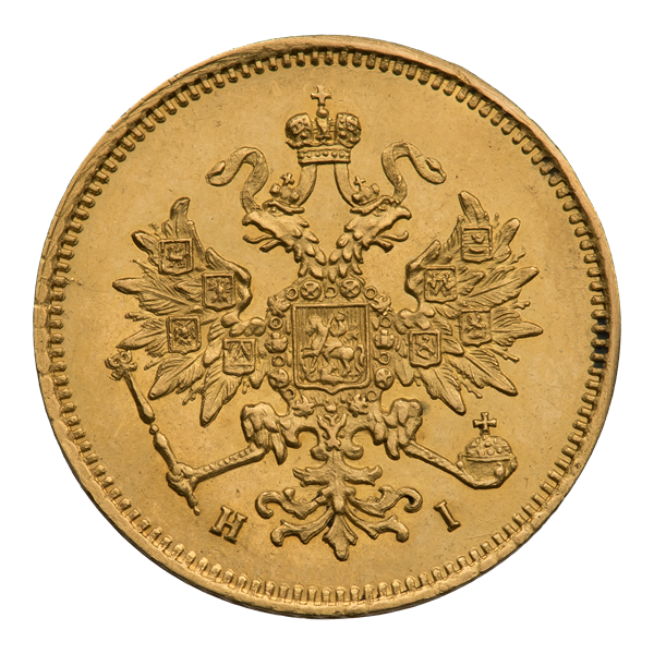 Три рубля 1869 г. (аверс). ГМ 298.XV.2; Биткин 31 (R). Двуглавый орёл с распростёртыми крыльями под тремя коронами; из верхней короны спускается развевающаяся Андреевская лента; на груди орла щит с гербом Москвы, окружённый цепью ордена св. Андрея Первозванного. На крыльях орла щиты с гербами Царства Казанского, Царства Польского, Царства Херсонеса Таврического, с соединённым гербом Великих княжеств Киевского, Владимирского и Новгородского, Царства Астраханского, Царства Сибирского, Царства Грузинского и Княжества Финляндского. В лапах орла скипетр и держава. Под орлом инициалы минцмейстера: Н — I (Н. Иосса).